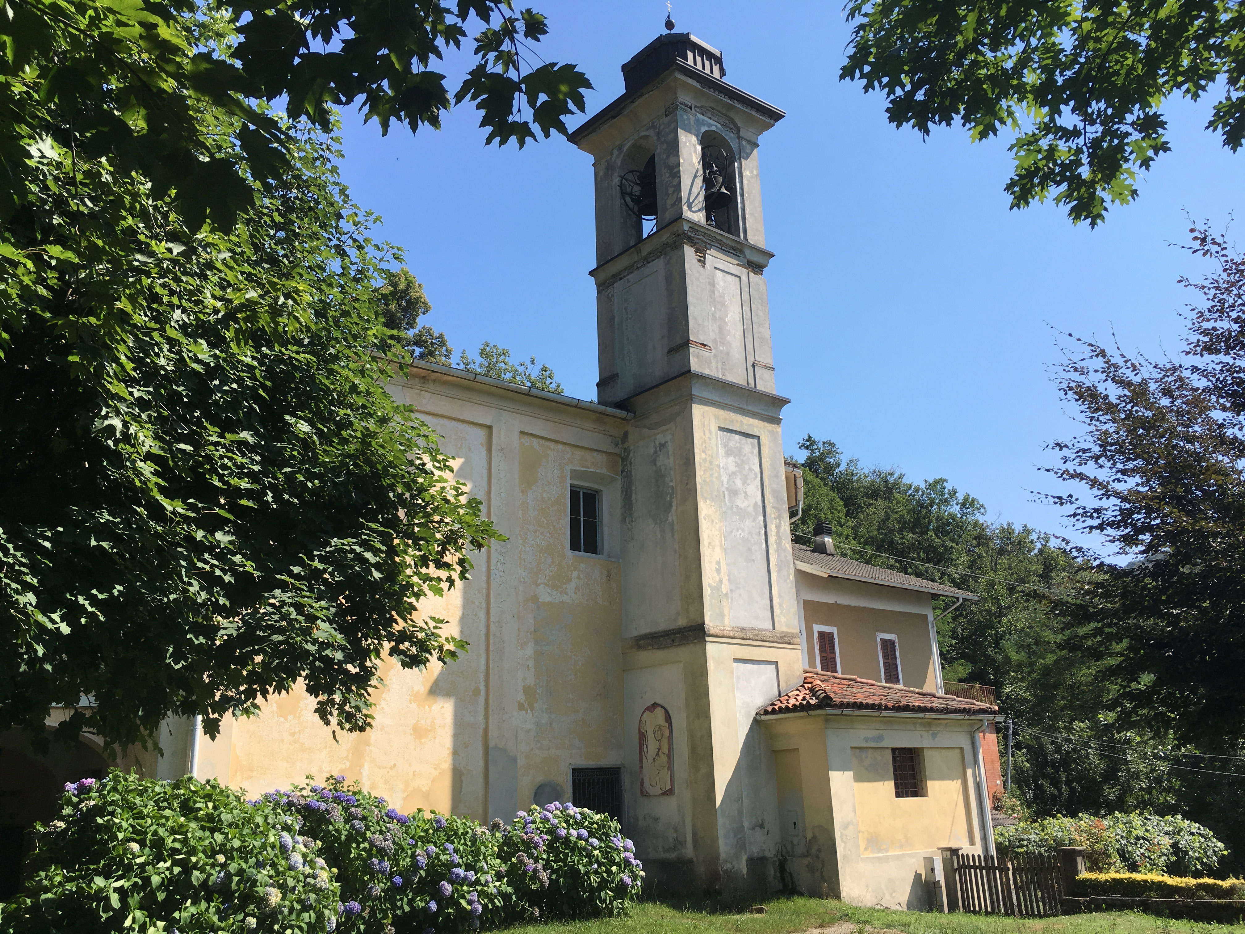 Aussenansicht der Marienwallfahrtskirche Santuario di Trezzo in Dumenza, Italien